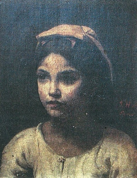 小女習作